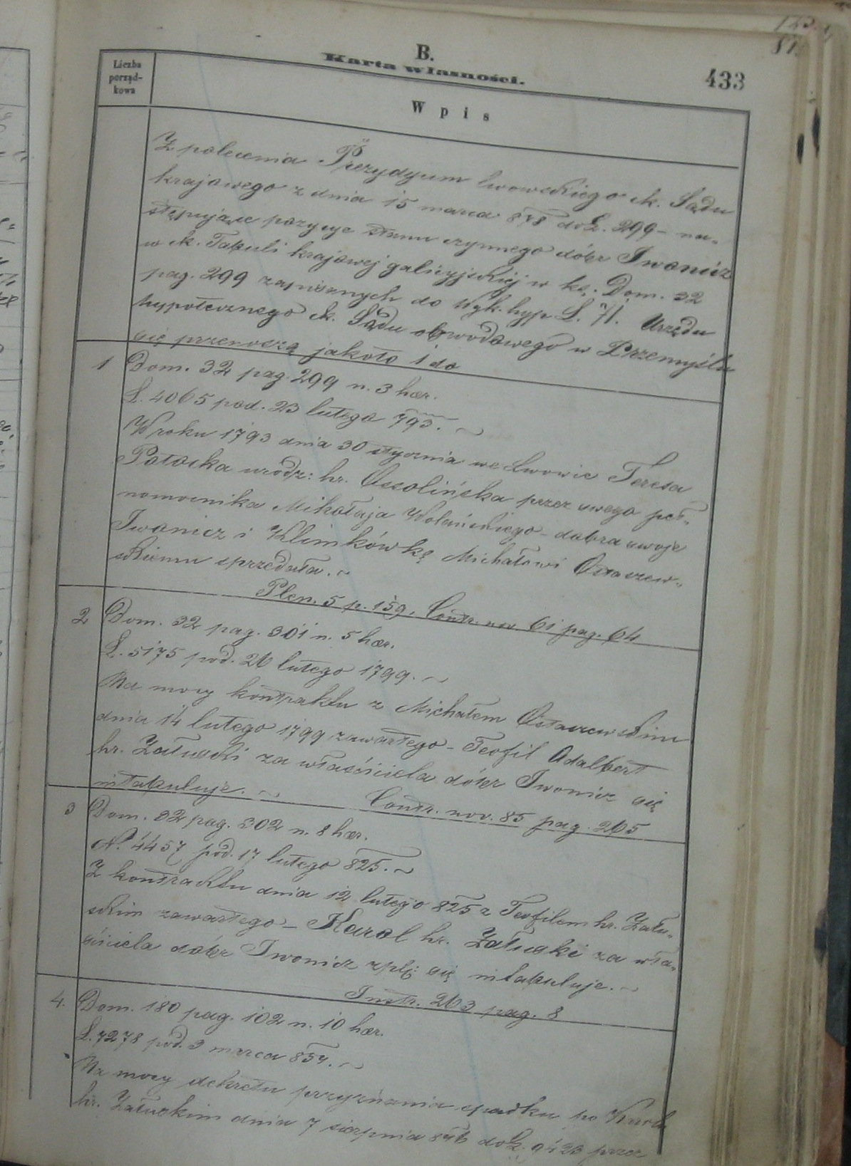 Karta z księgi tabularnej dóbr Iwonicz w Sądzie Rejonowym w Sanoku